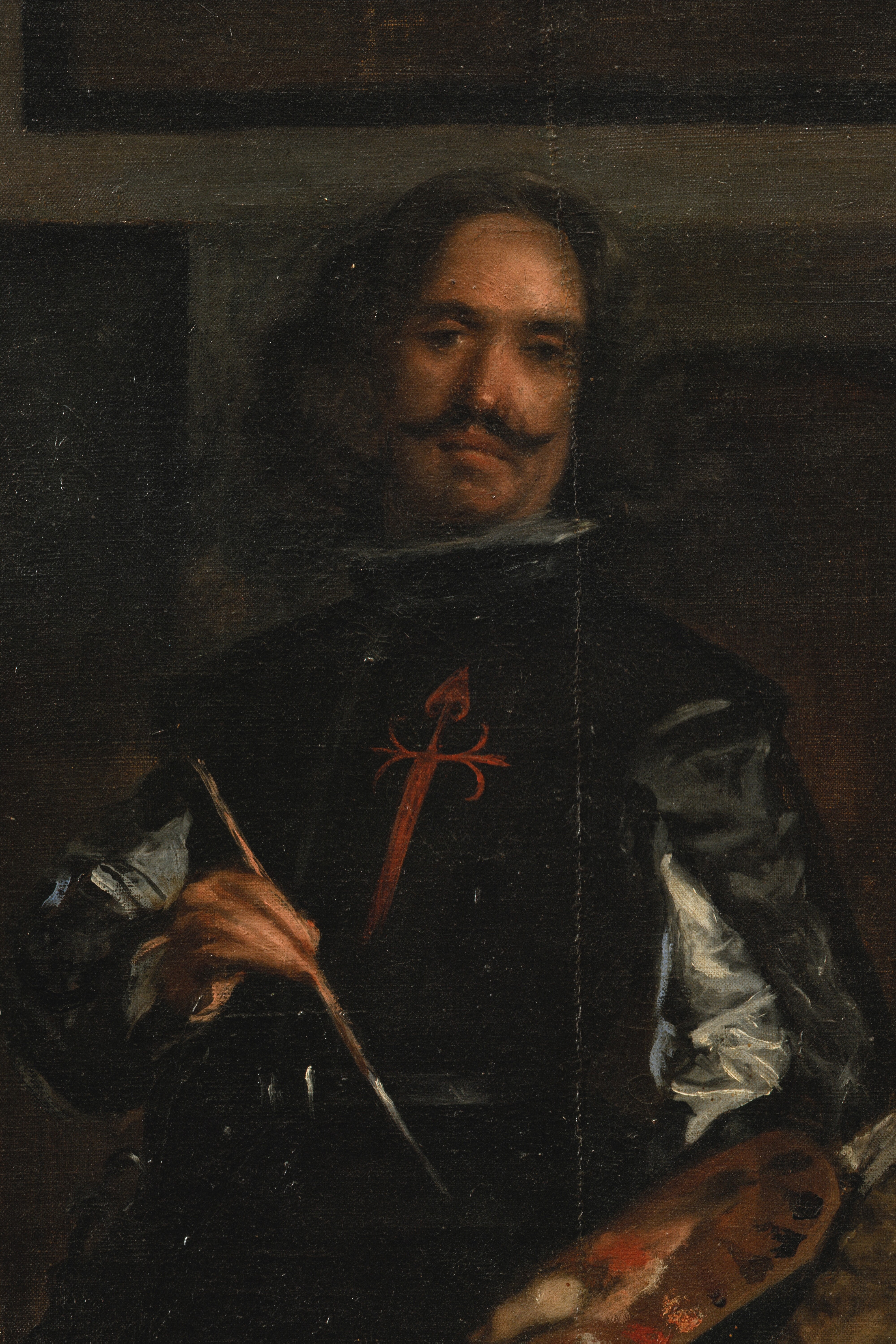 Self-portrait de Velázquez en Las Meninas